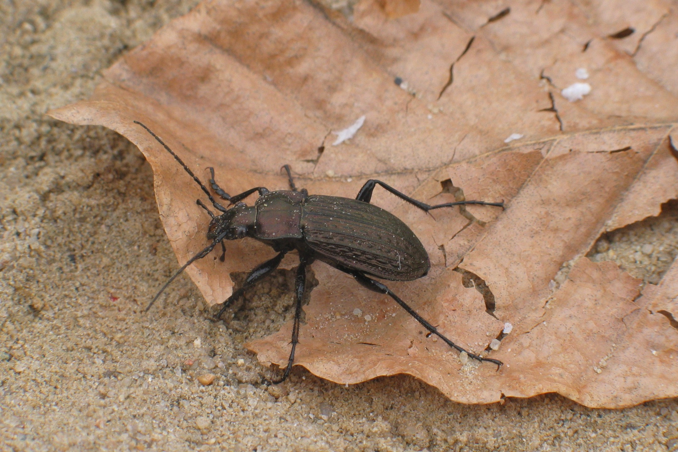 Körnerwanze (Carabus cancellatus)